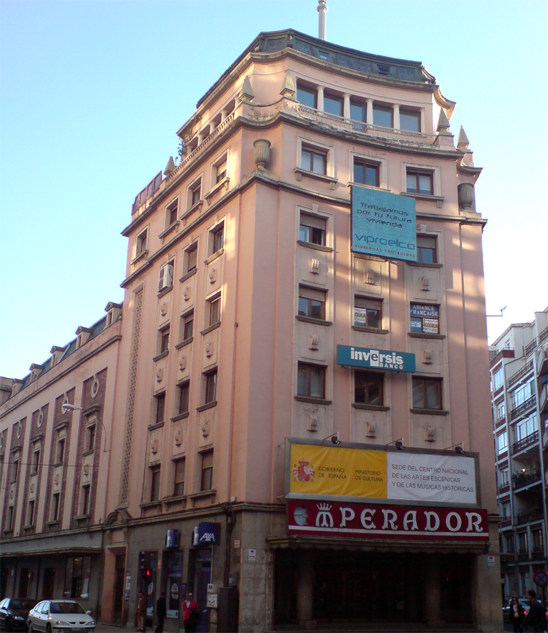 León (España). Teatro Emperador.